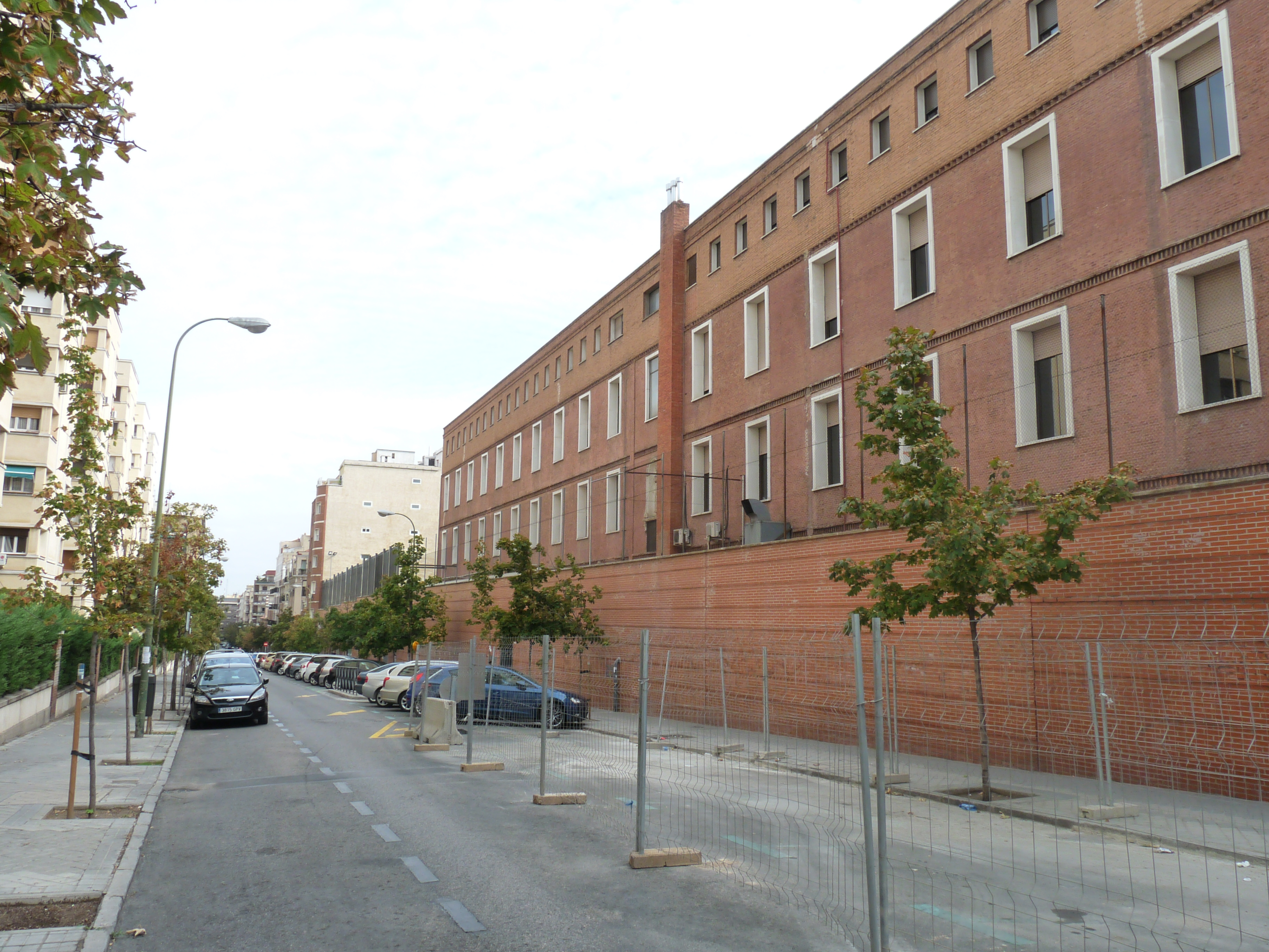 Calle de María de Guzmán, Madrid. Lateral del Colegio Divina Pastora.